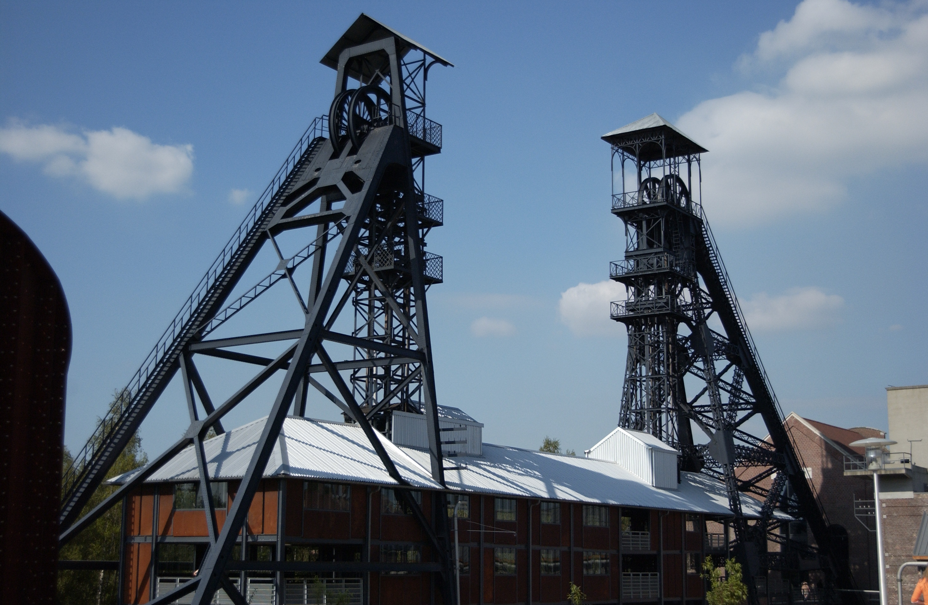 Charbonnage du Bois du Cazier